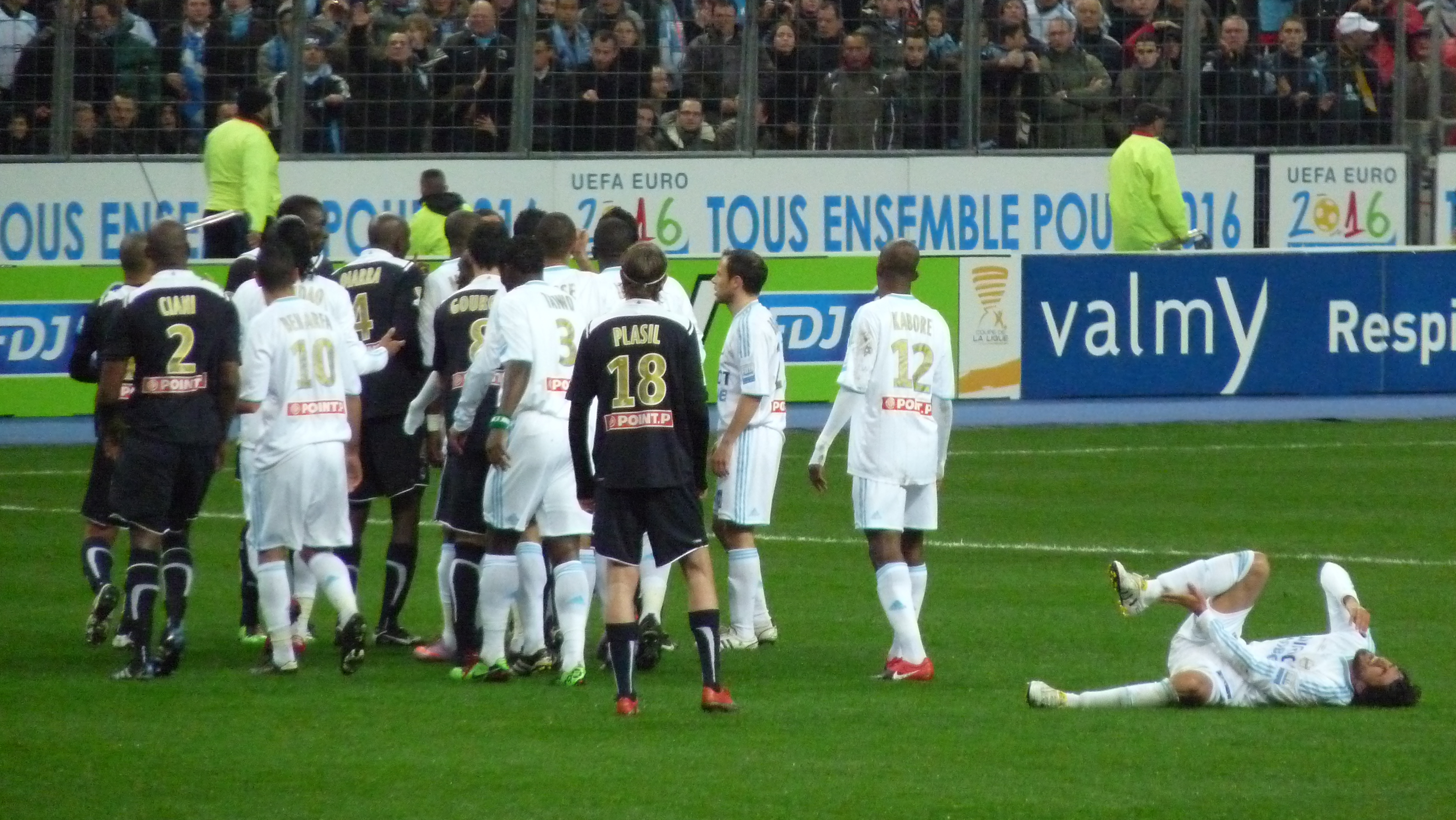 Finale de la coupe de la ligue - OM vs Bordeaux 3-1 - Stade de France - 27 mars 2010